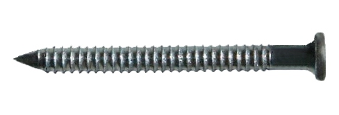 Ein Ankernagel